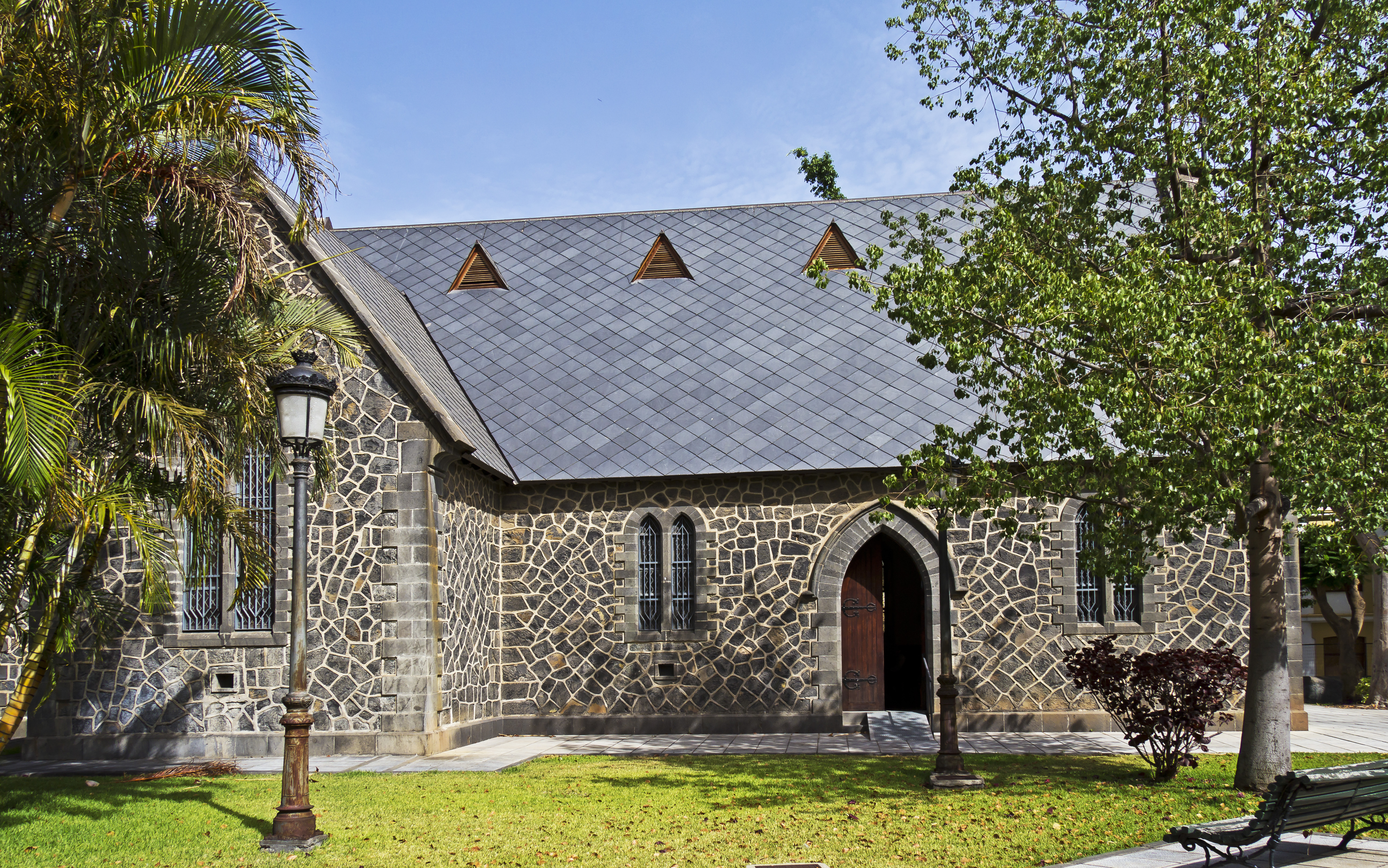 Die alte Anglikanische Kirche Saint George (San Jorge) wurde 1897 von dem Architekten Walter I. Wood entworfen. Sie befindet sich an der Plaza del 25 de Julio in Santa Cruz de Tenerife.